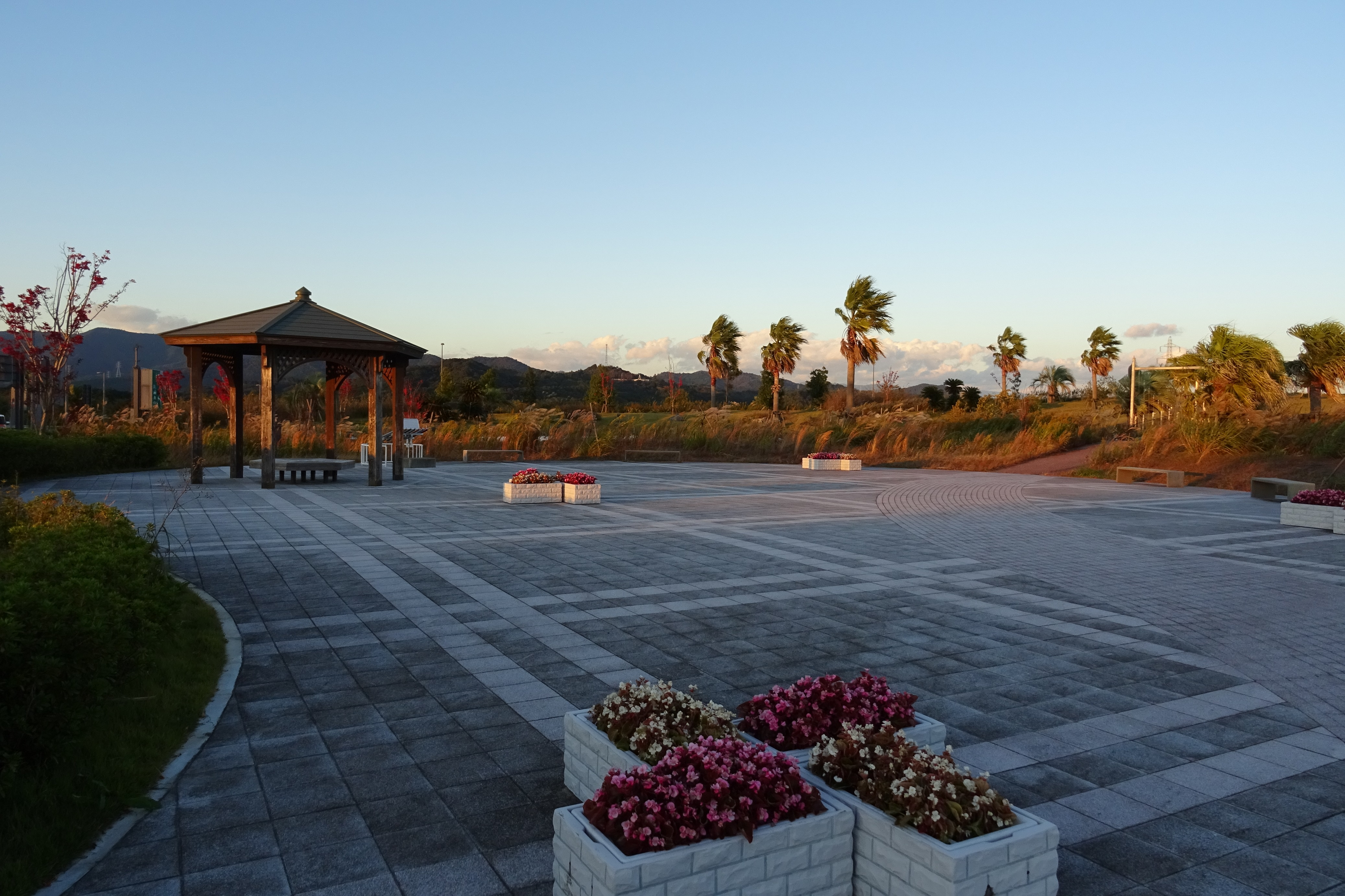 浜松サービスエリア